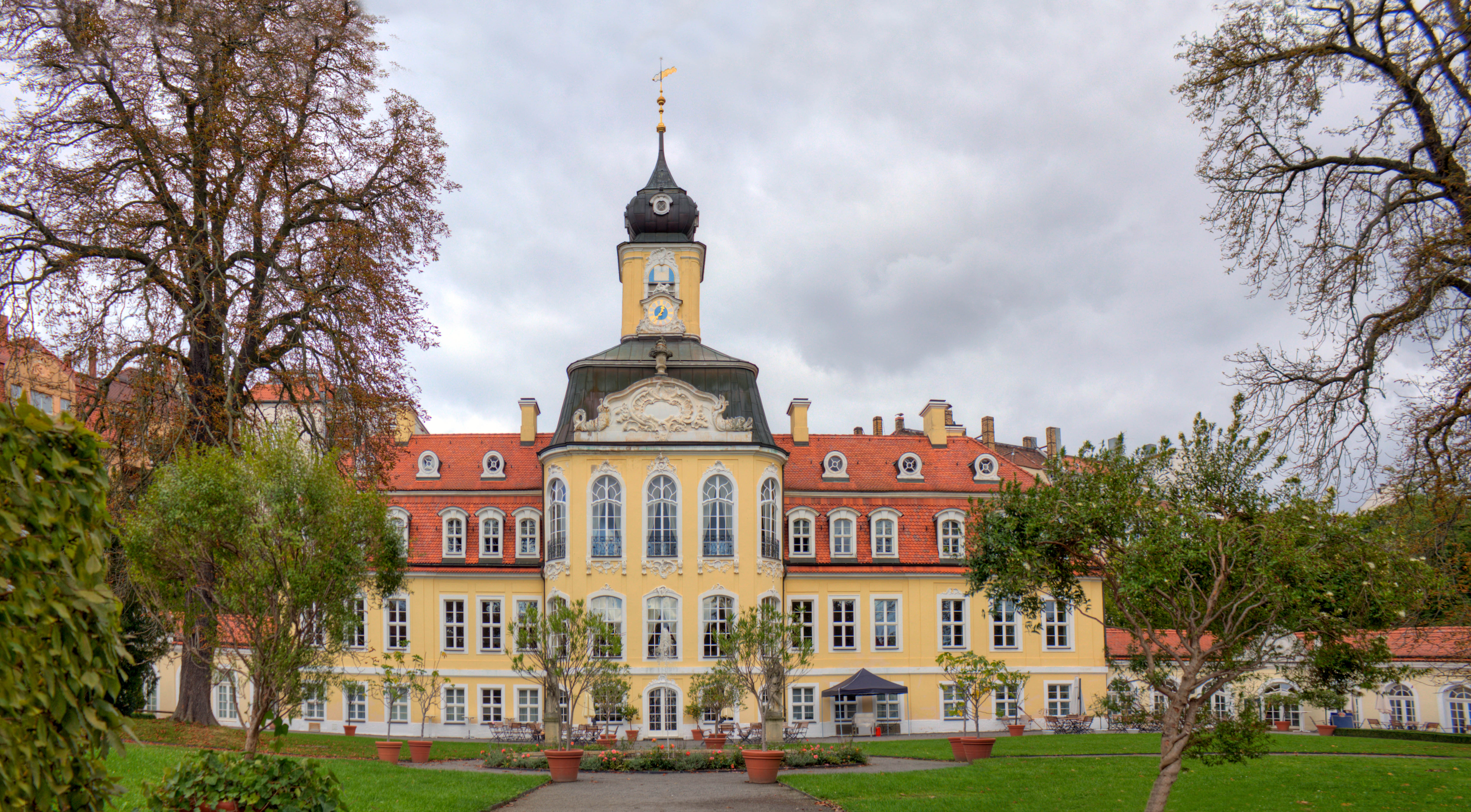 Leipzig, Gohliser Schlösschen